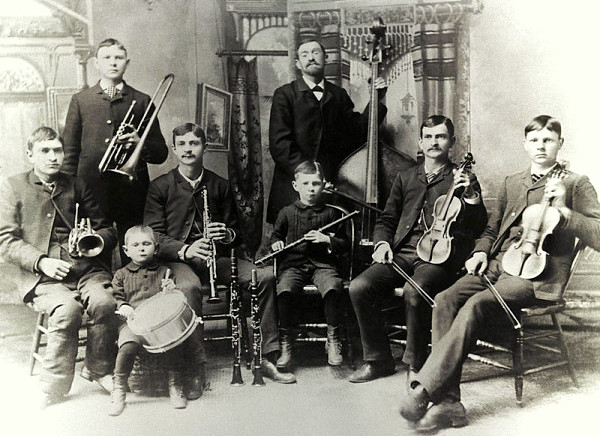 Die Bachfamilie in Amerika: August Reinhold Bach am Kontrabass